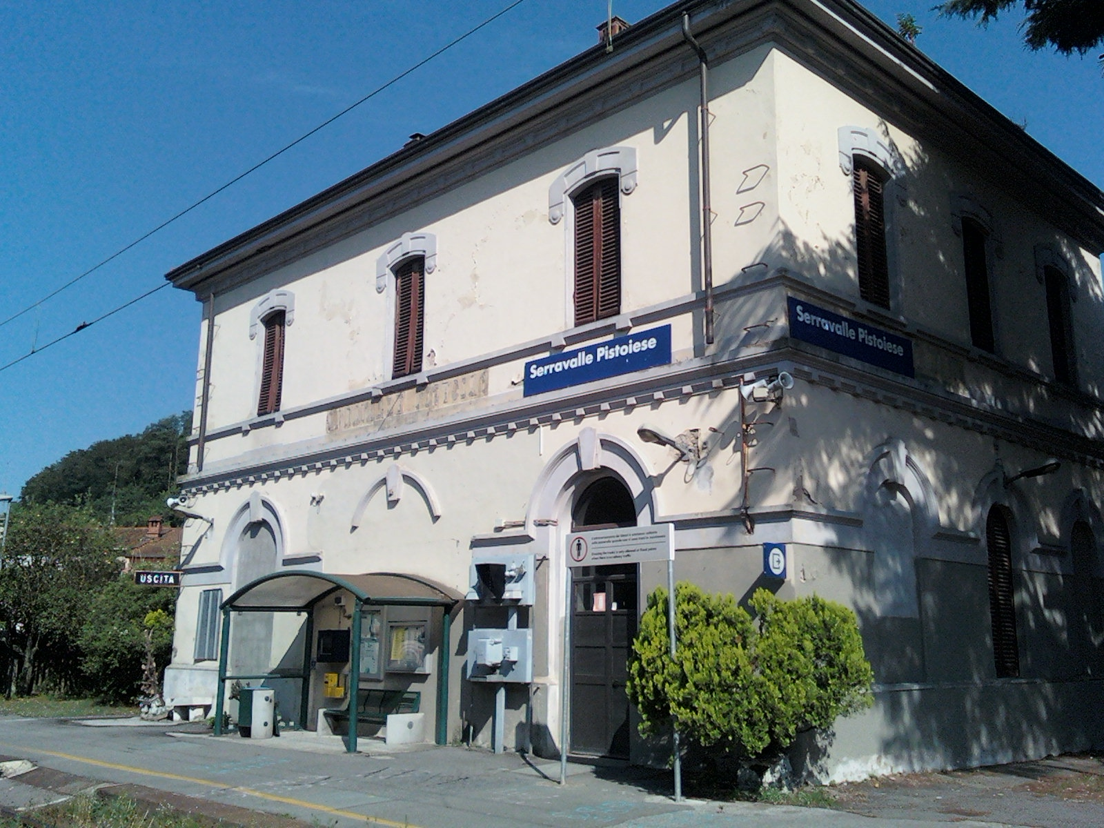 Stazione ferroviaria di Serravalle Pistoiese